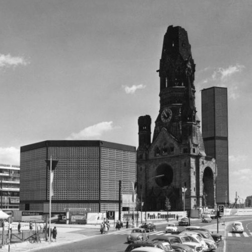 Juli 1961 West-Berlin, Kaiser-Wilhelm-Gedächtnis Kirche und Kurfürstendamm